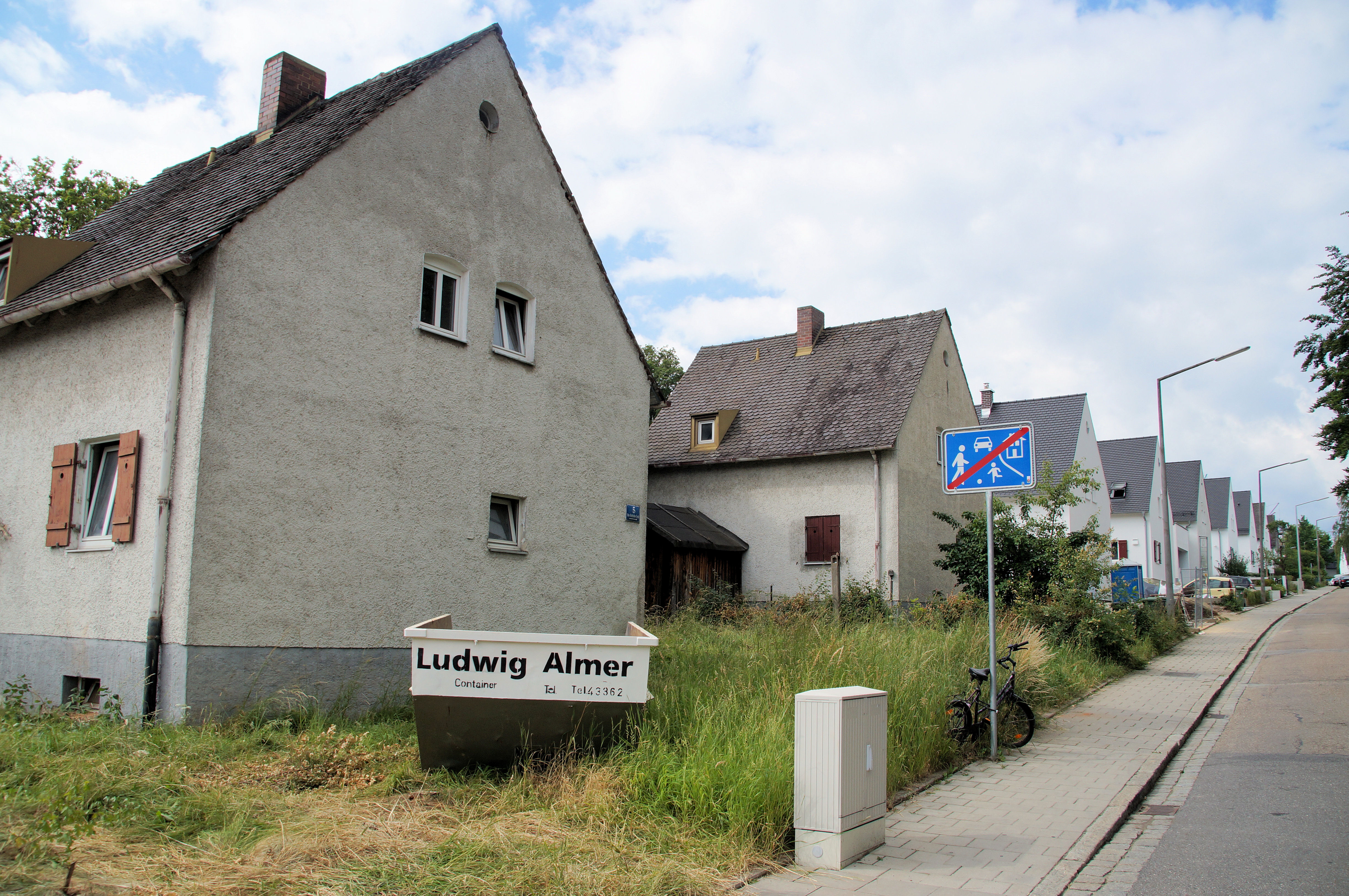 Ensemble Ganghofer-Siedlung, Regensburg, Von-Richthofen-Straße This is a photograph of an architectural monument.